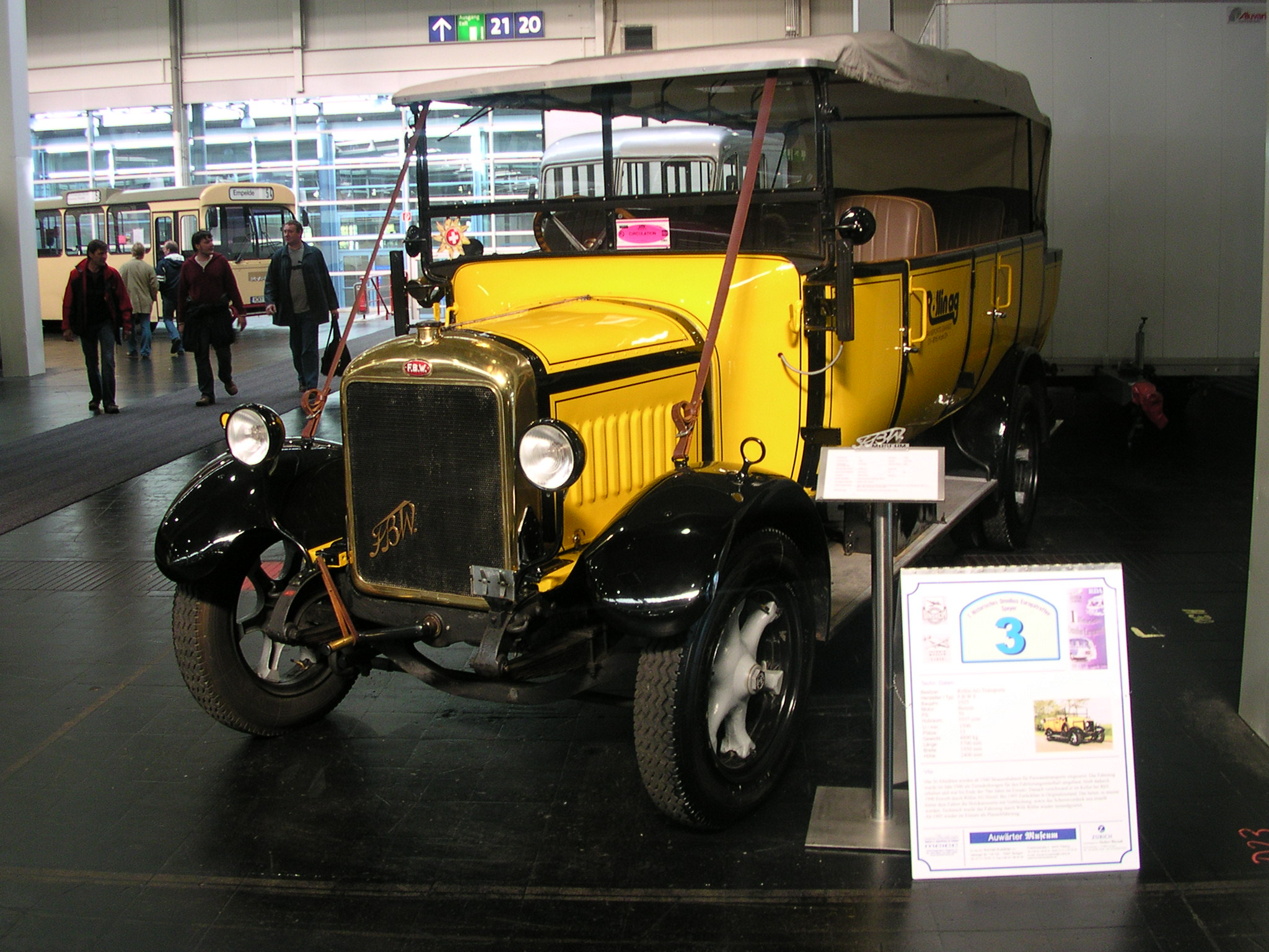 FBW-Bus bei der IAA für Nutzfahrzeuge 2004 in Hannover.